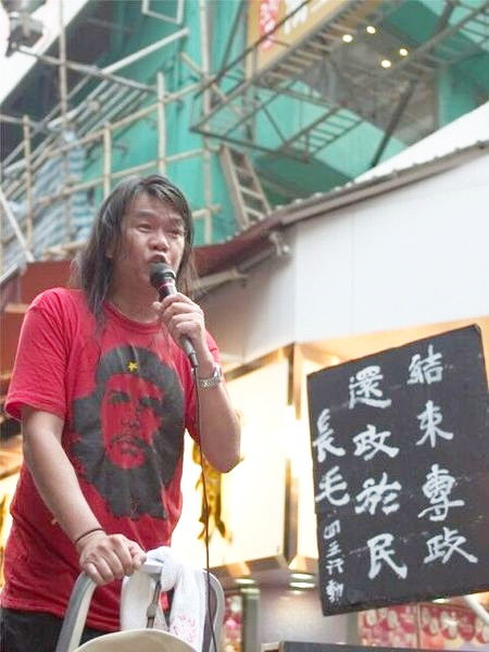 中文（香港）: 穿捷·古華拉T衫的梁國雄，左手邊的黑底白字立牌是他寫的四五行動標語牌「結束專政，還政於民」。愛國者攝於2004年7月1日之香港七一遊行。